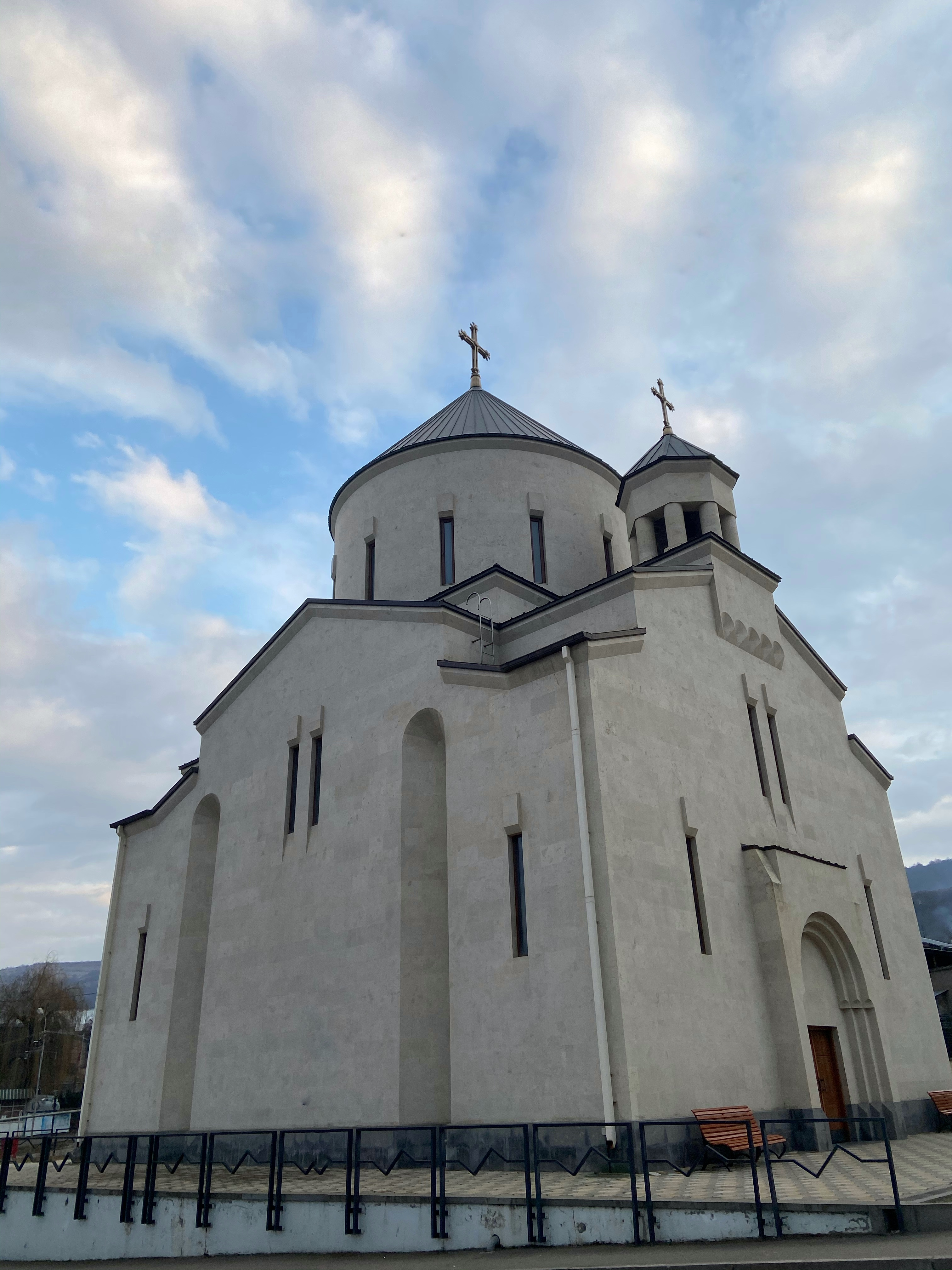 Սուրբ Հովհաննես եկեղեցի